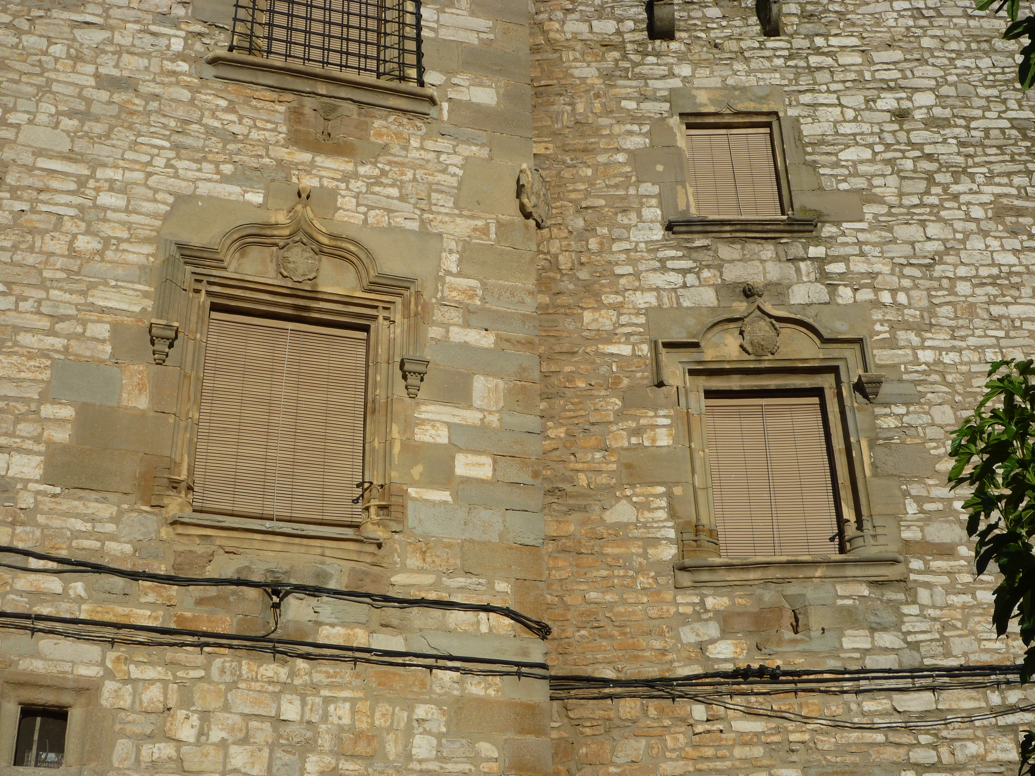 Castell de l'Oluja Baixa (les Oluges): detall de la façana